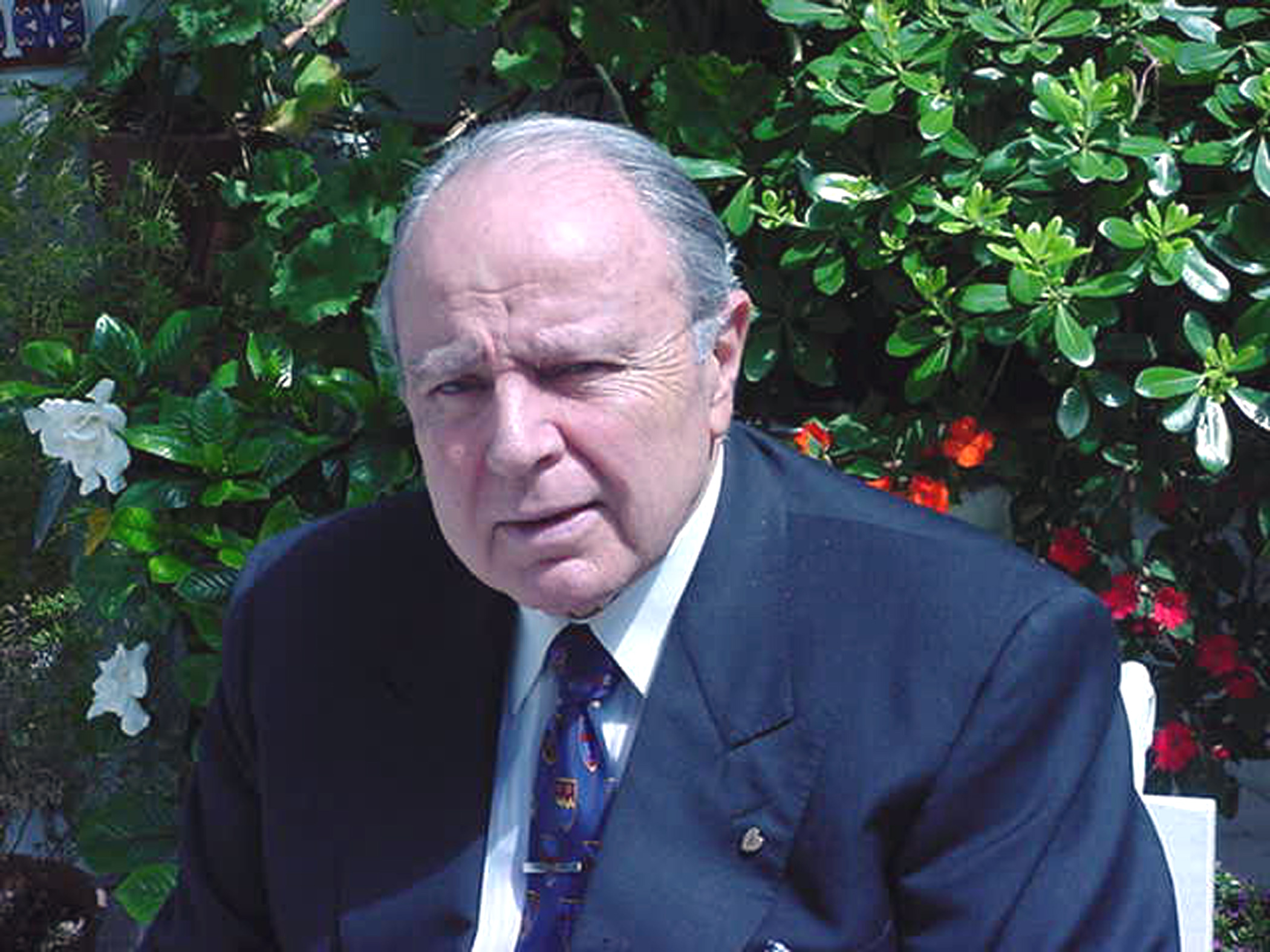 Dr. Domingo Liotta en Buenos Aires, Argentina. Feb 2007